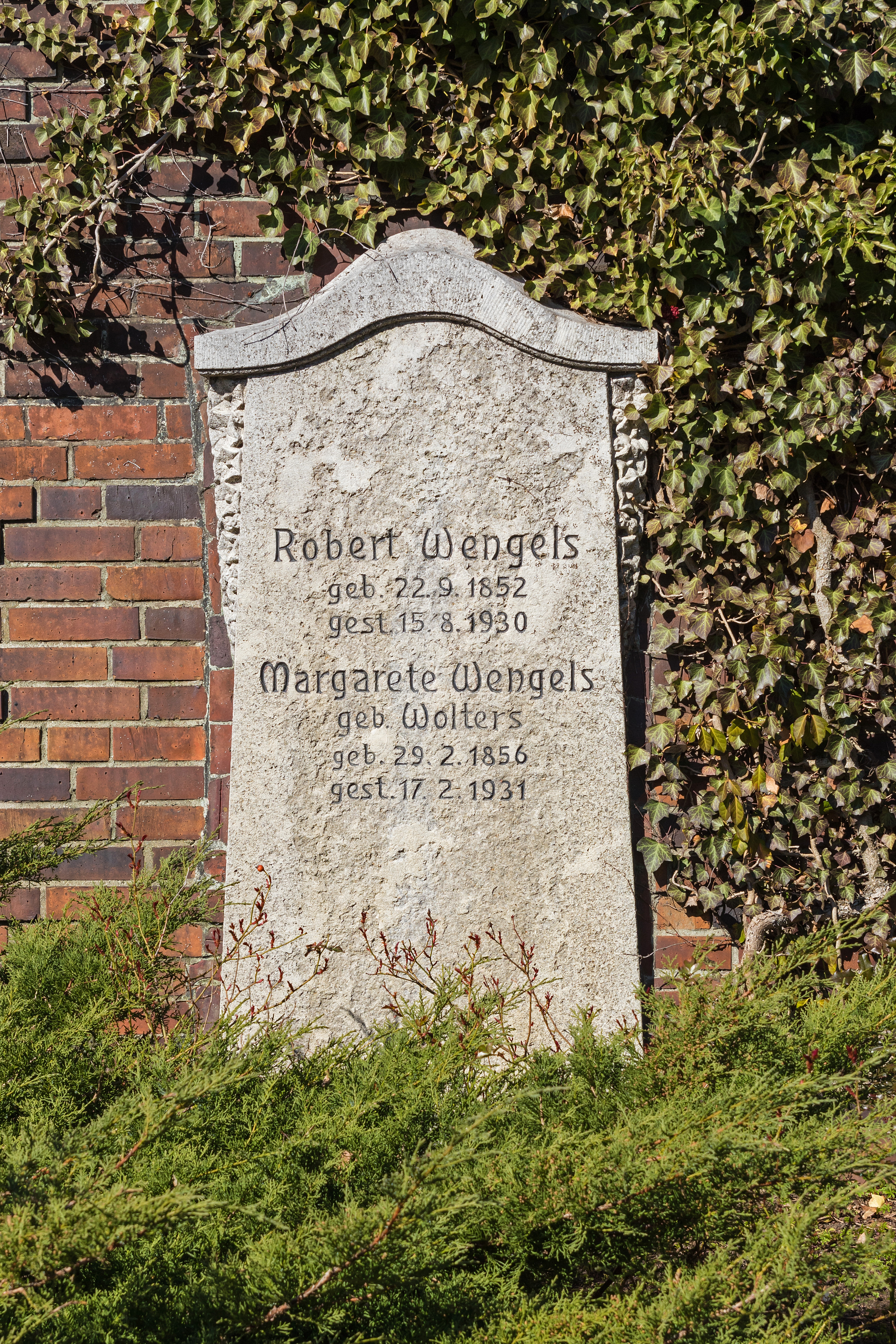 Zentralfriedhof Friedrichsfelde, Berlin-Lichtenberg. Gedenkstätte der Sozialisten, Grab von Robert und Margarete Wengels